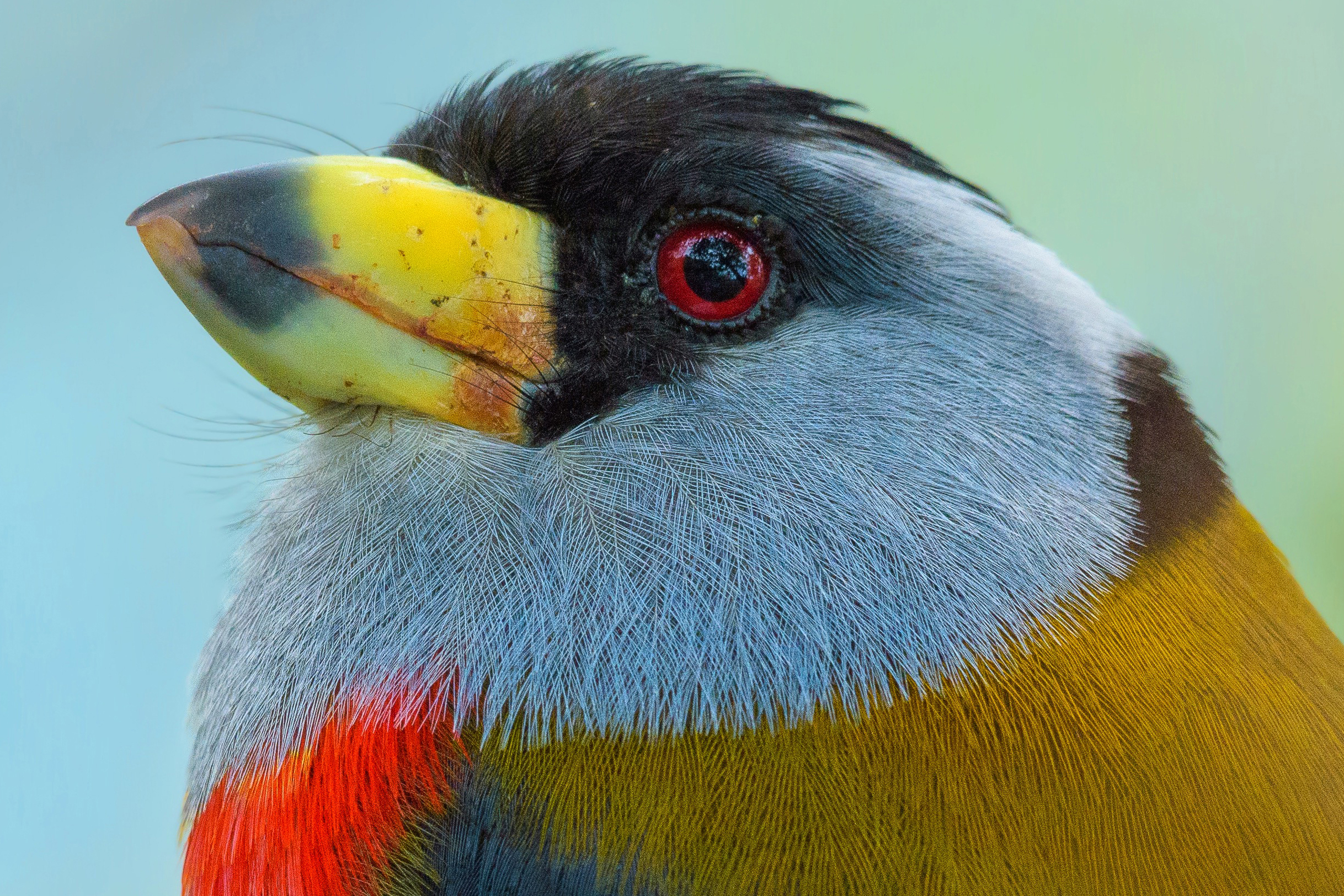 Semnornis ramphastinus es un barbudo robusto, de tamaño medio con un peso entre 80 y 115 gramos. Son aves muy coloridas de una morfología inconfundible. Se caracterizan por tener un pico muy robusto con maxila amarilla y mandíbula verde clara, ambos con puntas negras.